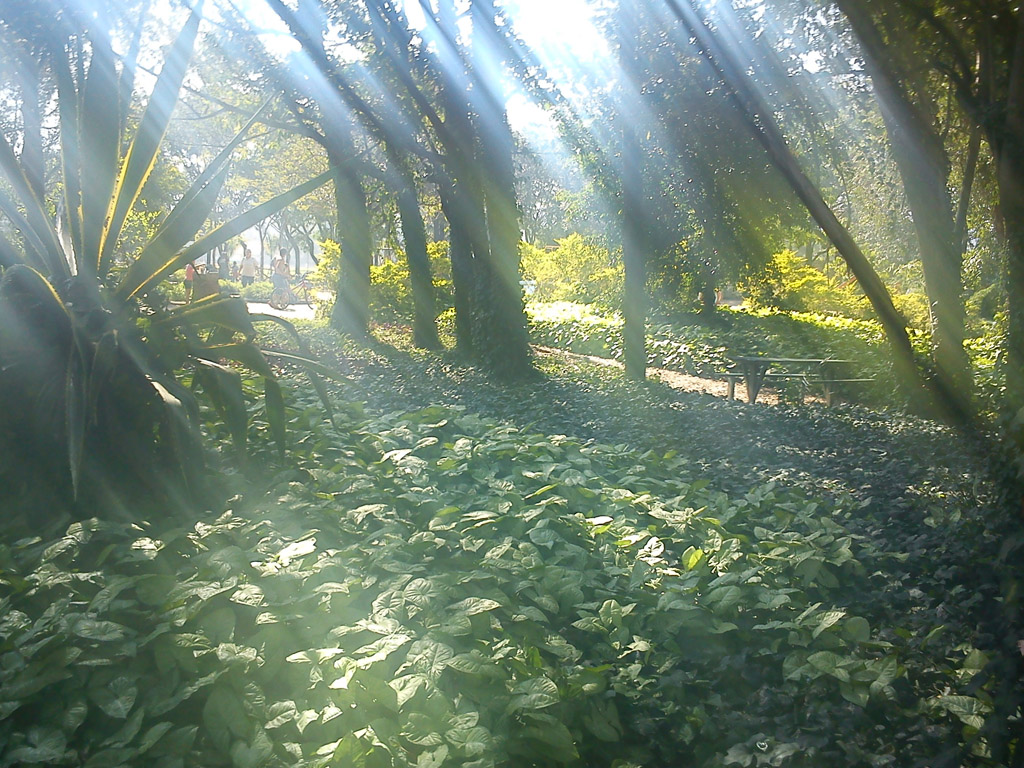 Parte da vegetação próxima ao parquinho das crianças e próxima a área para churrasco.